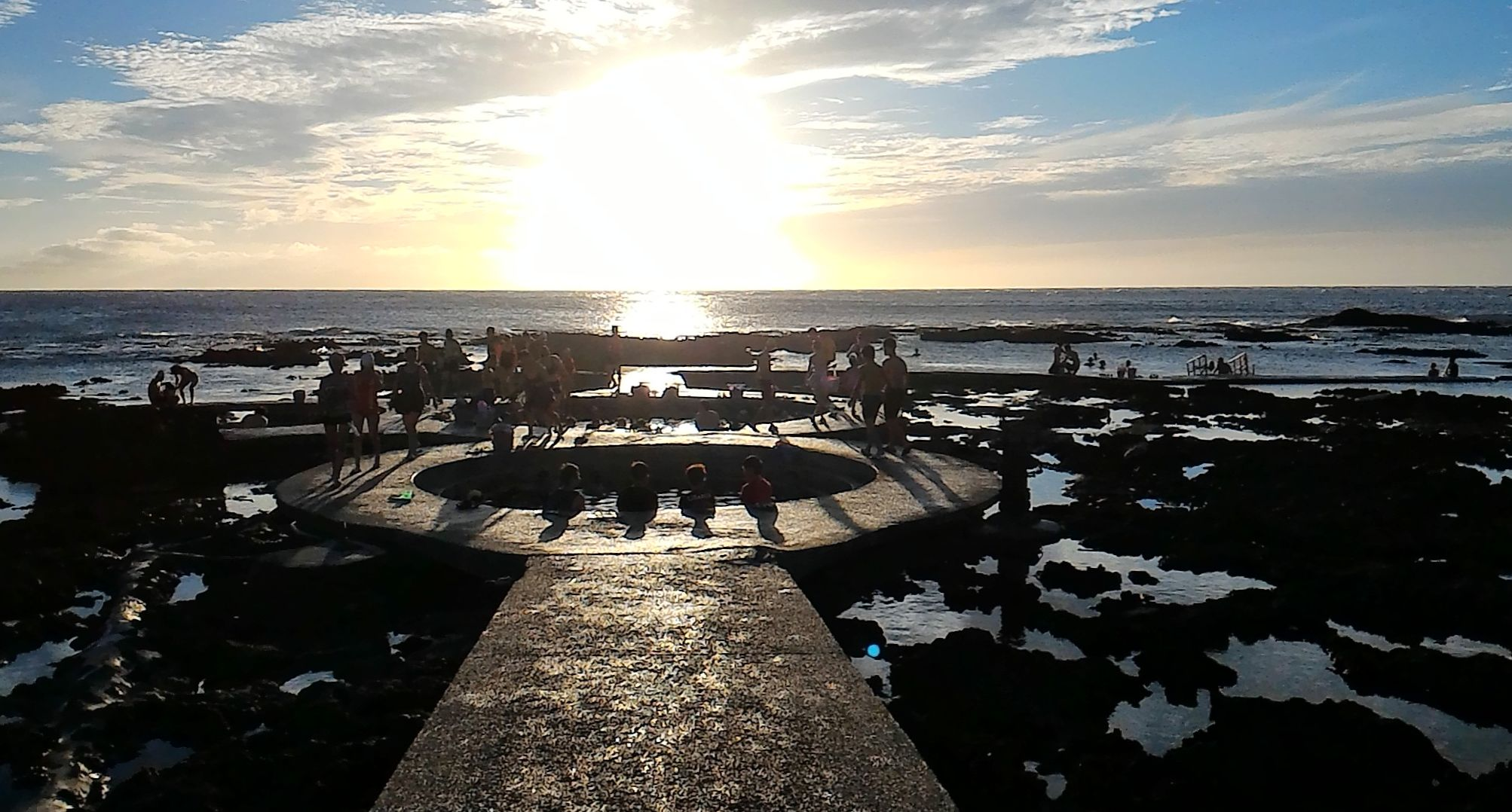 中文（台灣）: 臺灣綠島朝日溫泉。